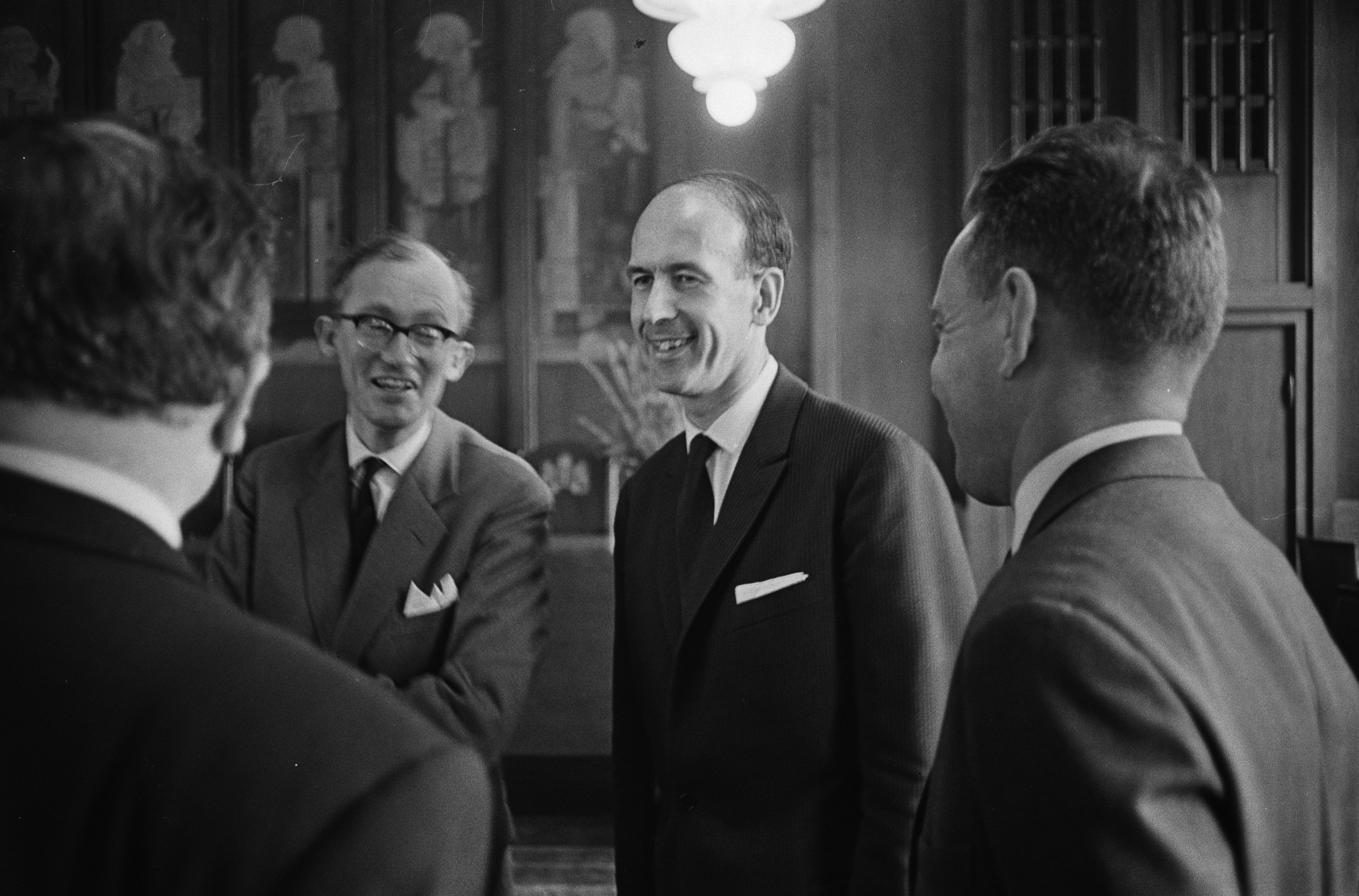 Collectie / Archief : Fotocollectie Anefo Reportage / Serie : [ onbekend ] Beschrijving : Ministers van Financien van de landen van de EEG bijeen Amsterdamse stadhuis, aankomst minister Witteveen op het stadhuis Datum : 20 juli 1964 Trefwoorden : aankomsten, stadhuizen Persoonsnaam : Witteveen, Johan Instellingsnaam : EEG Fotograaf : Pot, Harry / Anefo Auteursrechthebbende : Nationaal Archief Materiaalsoort : Negatief (zwart/wit) Nummer archiefinventaris : bekijk toegang 2.24.01.05 Bestanddeelnummer : 916-6620